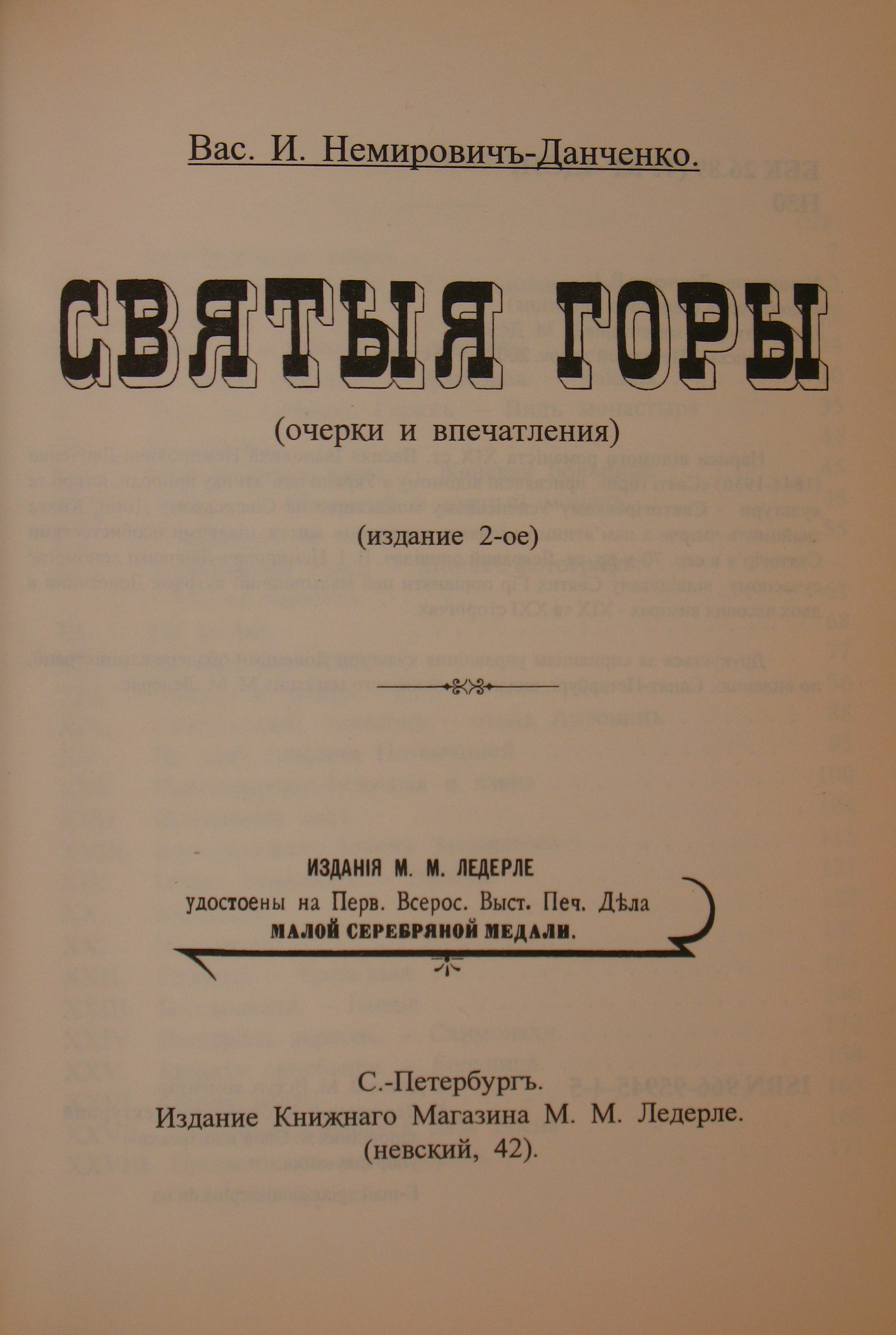 Василий Иванович Немирович-Данченко. "Святыя горы" (о Святогорском монастыре Харьковской епархии). Книга. Издание 2-е, цензурированное (Ледерле, Невский проспект, 42), 1886, титульный лист.